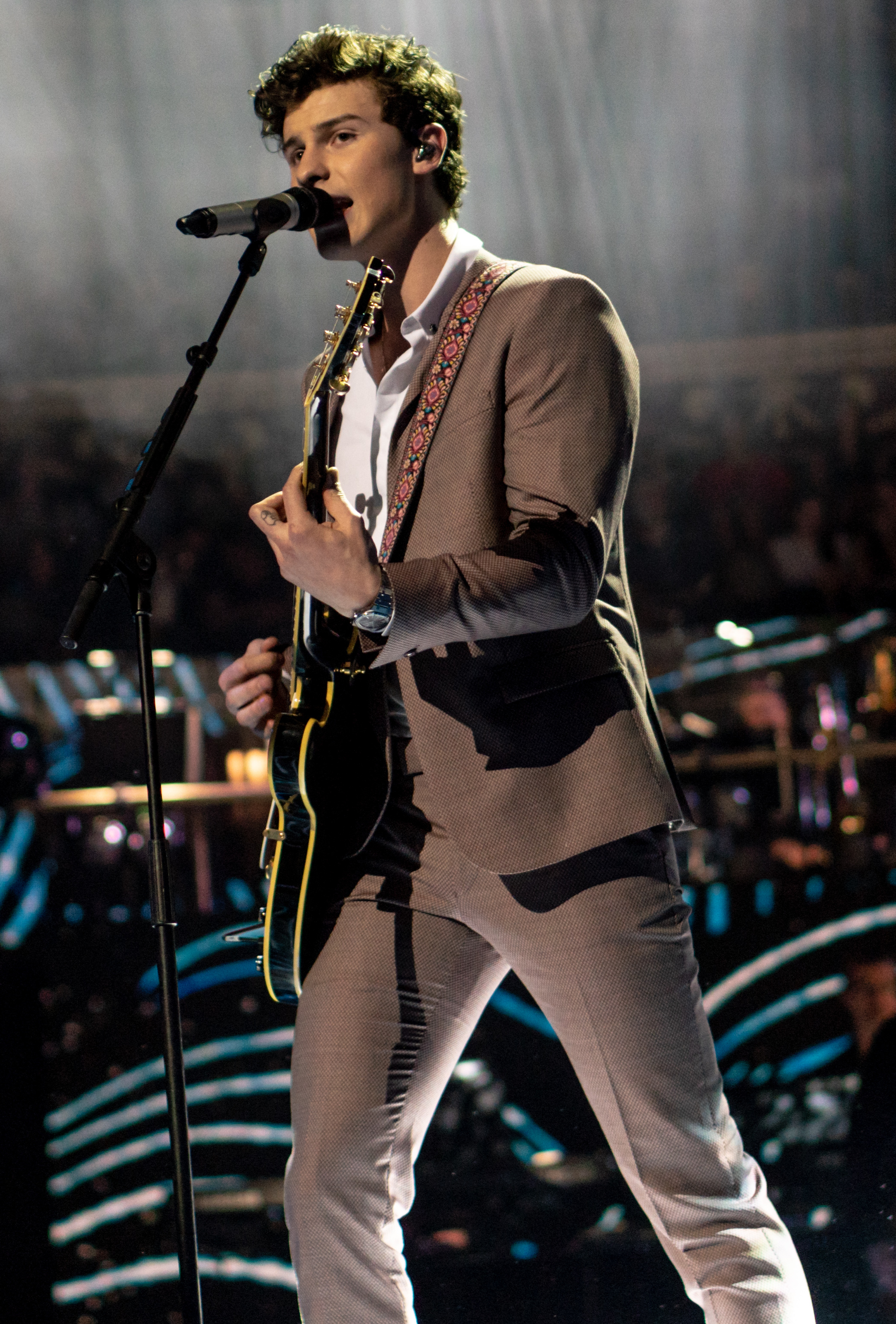 QueenbdayRAH210418-28